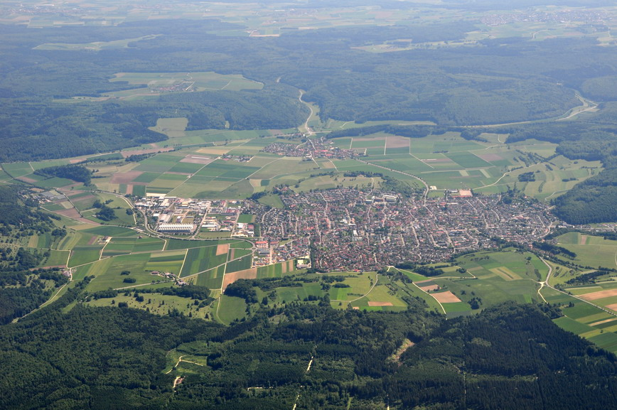 Der Krater von Norden aus gesehen (Luftaufnahme)